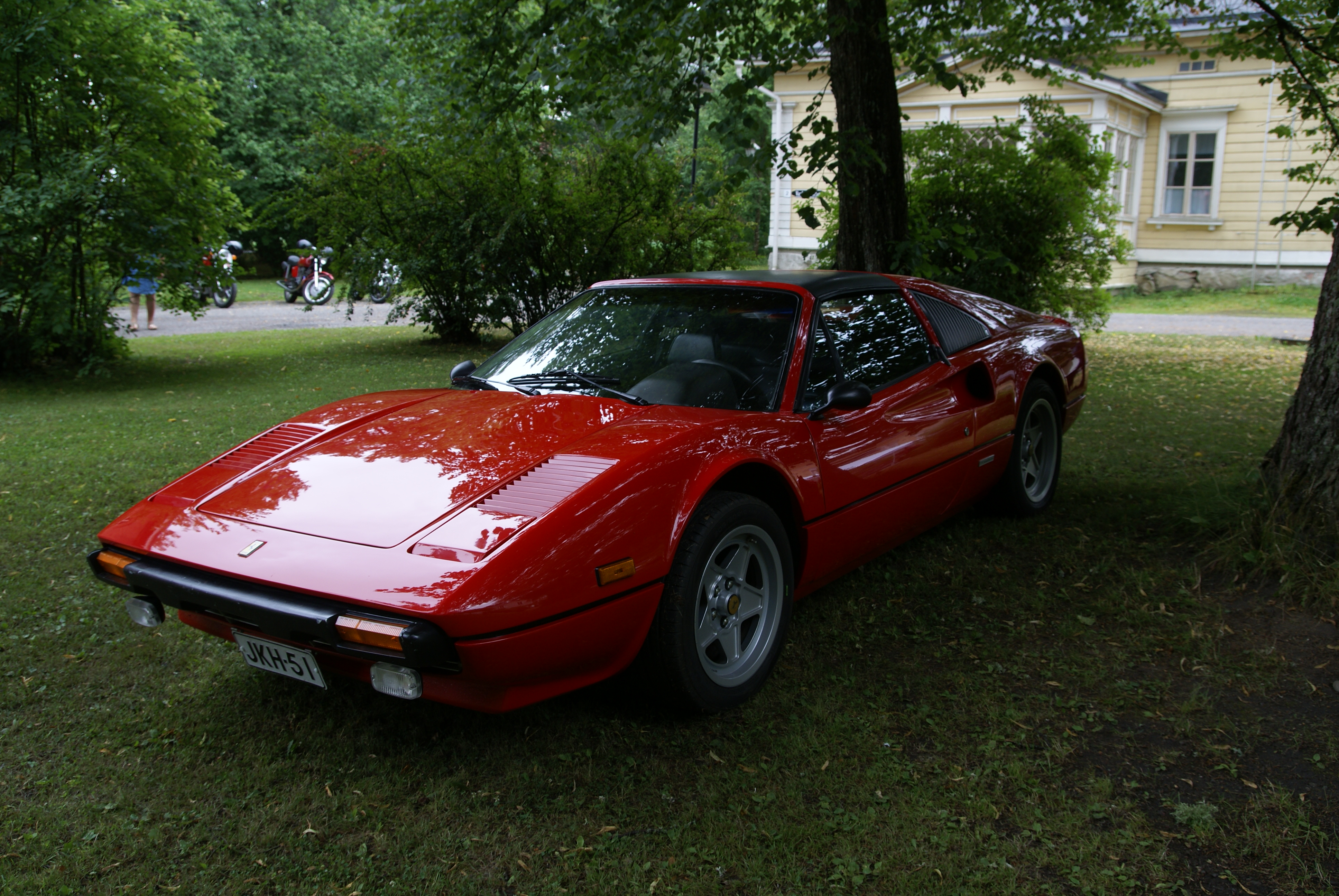 Kuvan auto Forssassa "Bella Italia" näyttelyssä 21.7.2018